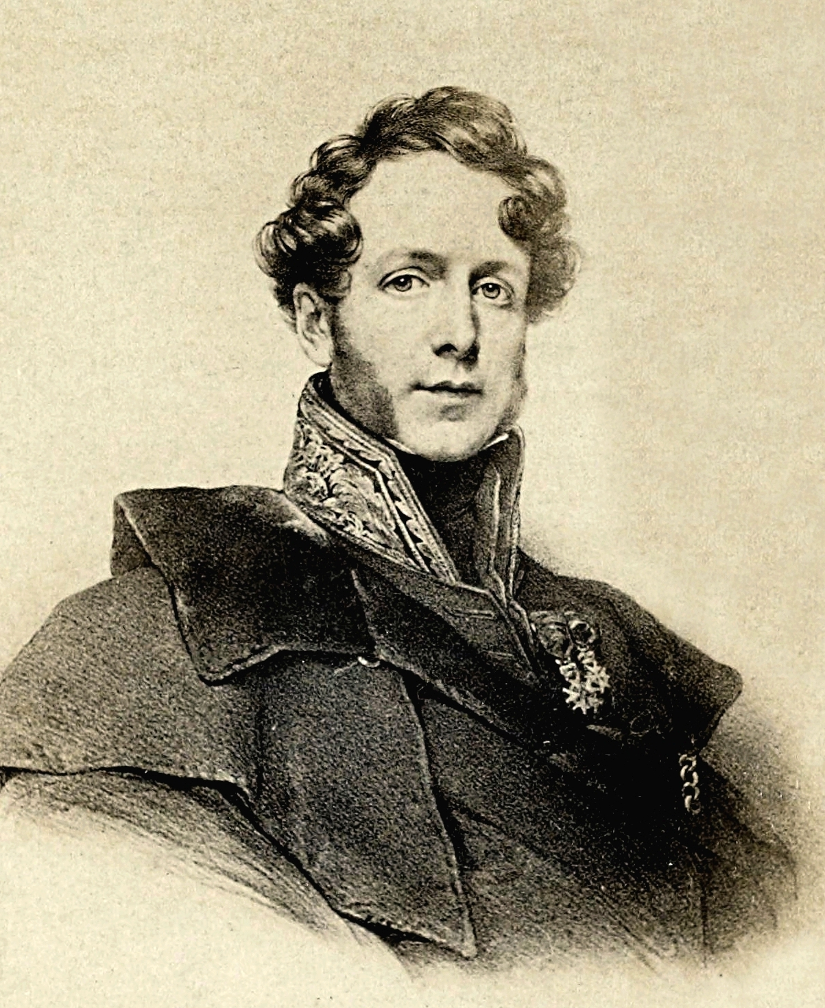 Jacques Boucher de Perthes, 1833